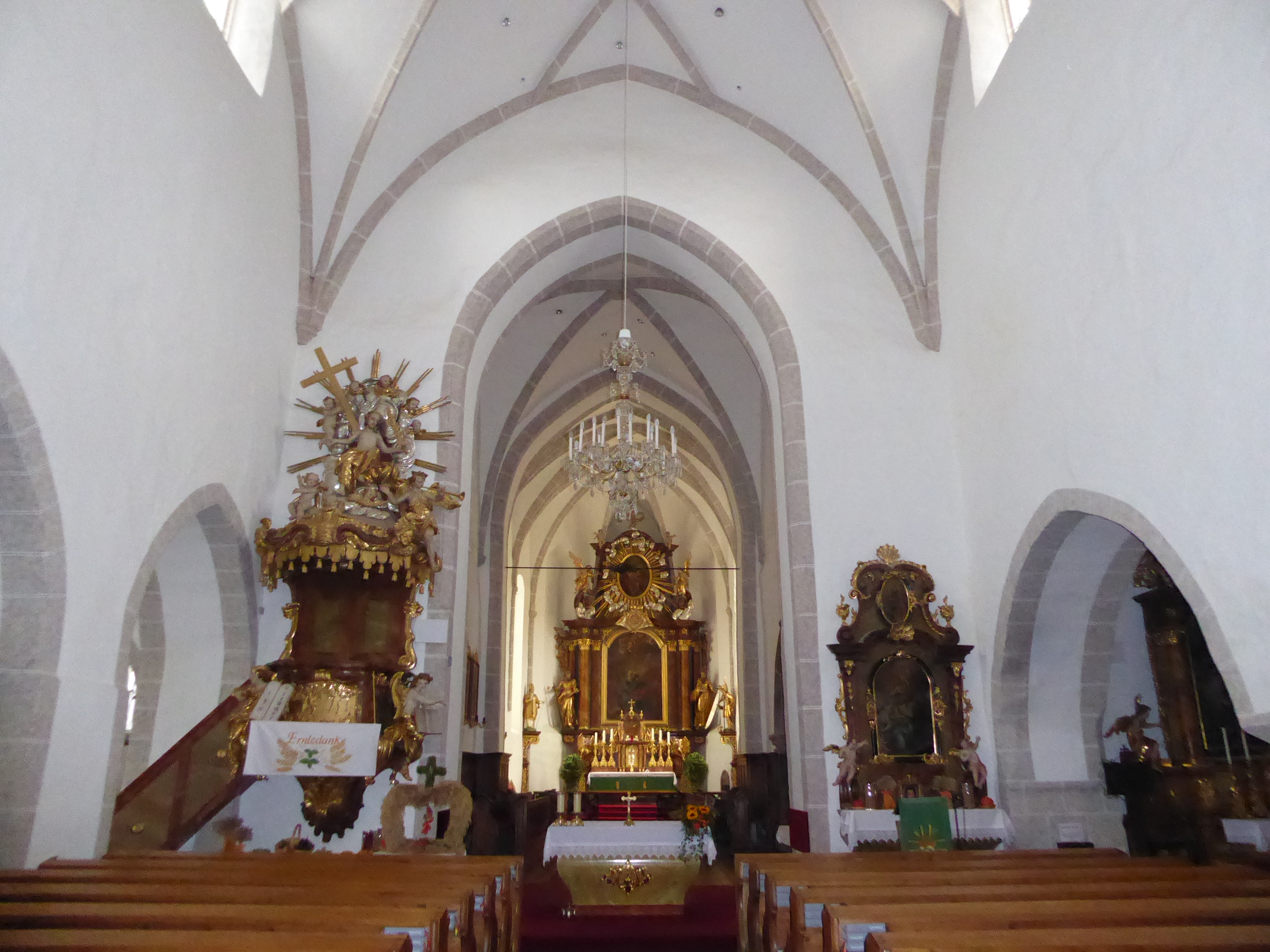 Pfarrkirche hll. Peter und Paul, Kirchenplatz 110, Weitra, Niederösterreich